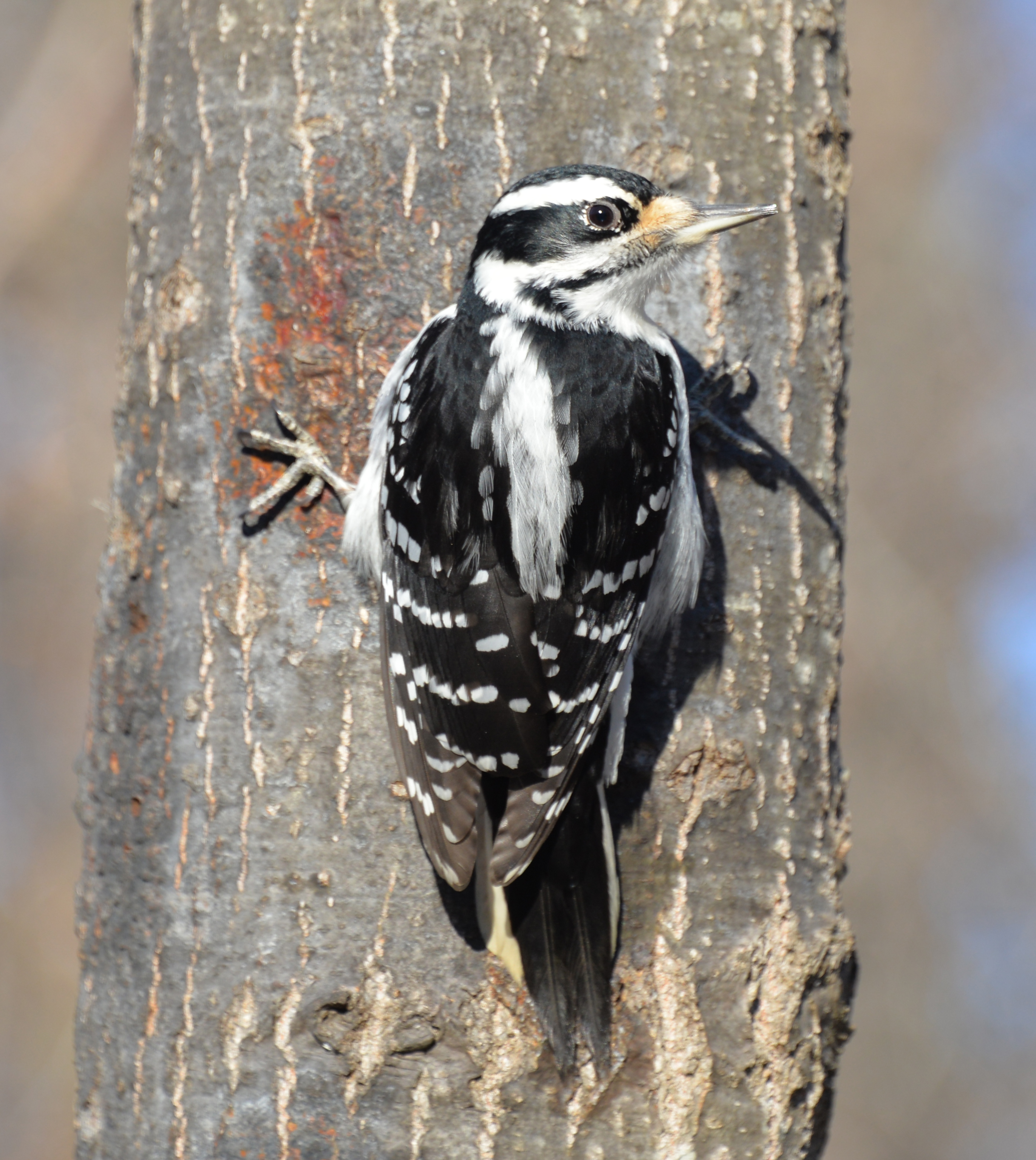 Дятел волохатий (Leuconotopicus villosus) (самиця) у парку Джеймс Ґарденс у Торонто, Онтаріо, Канада